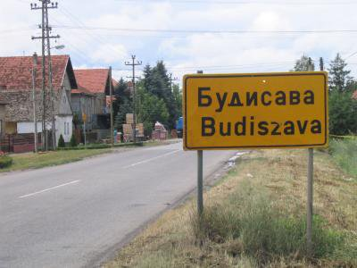 Tabla na ulazu u Budisavu